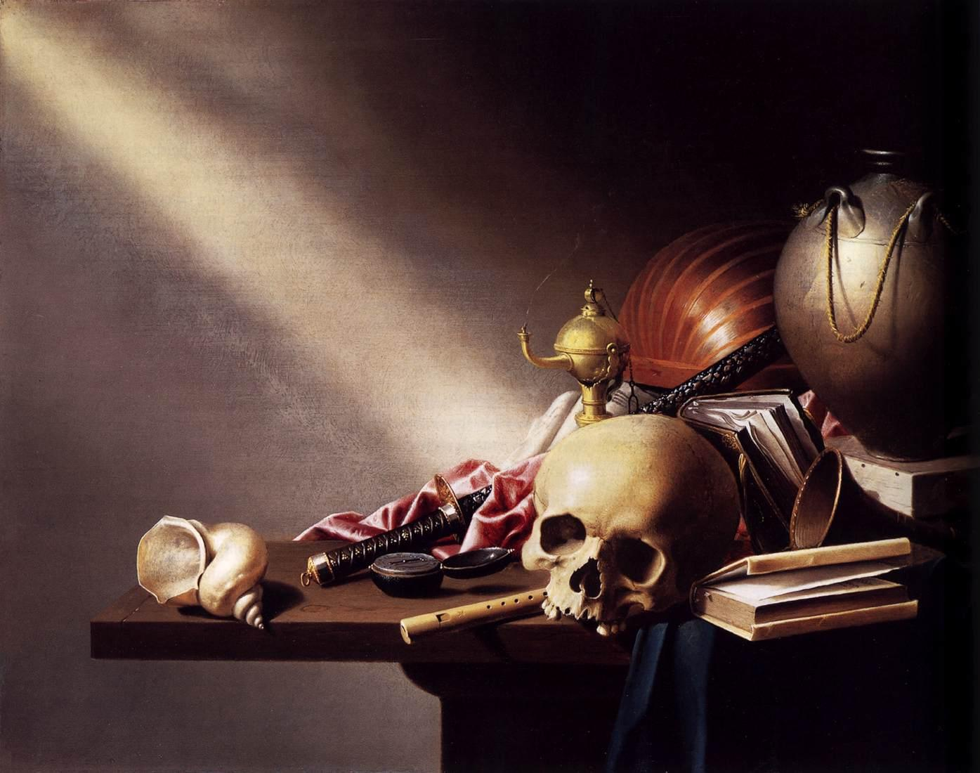 Still Life